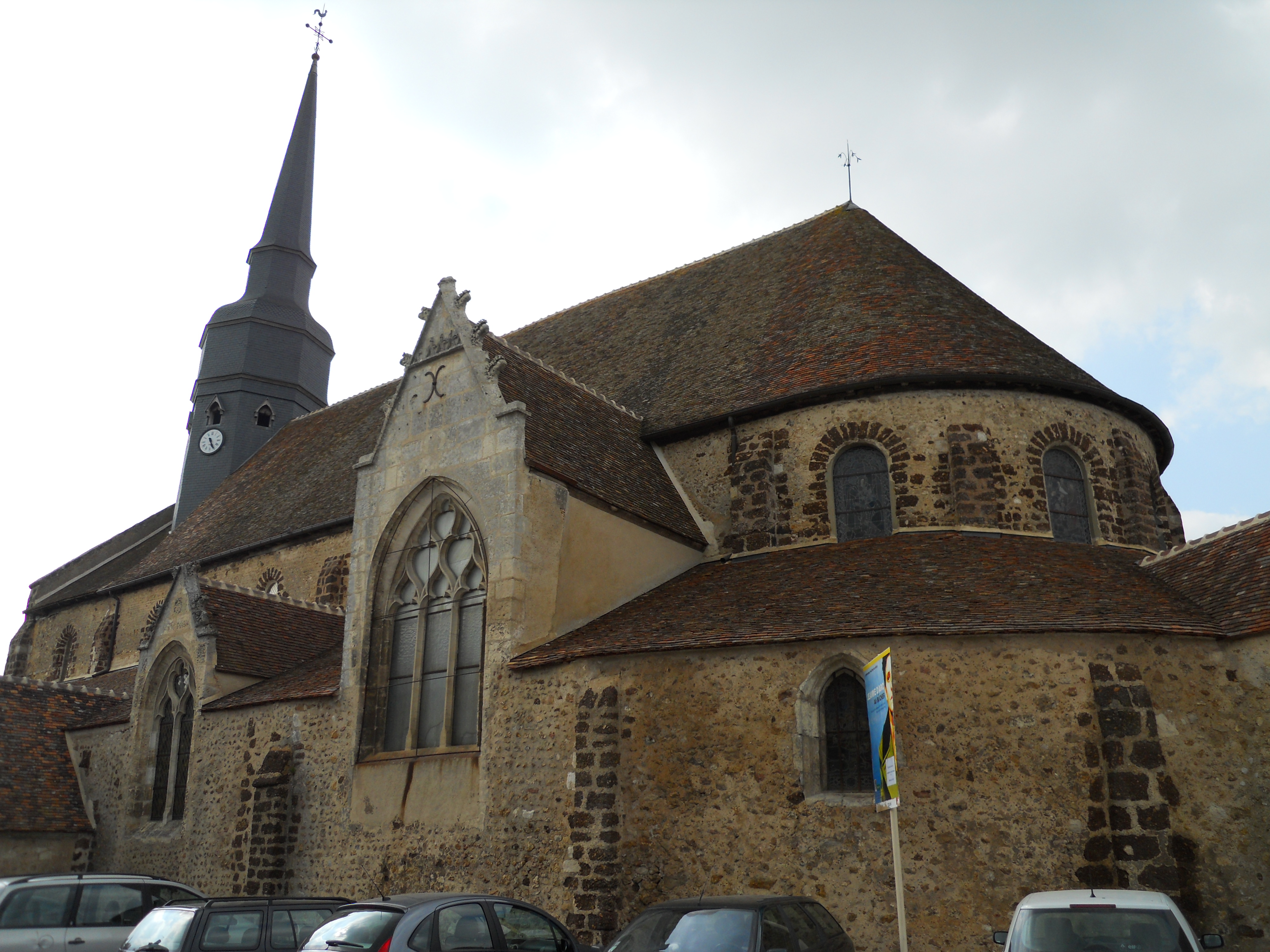 Église Saint-Georges de Dangeau, (Classé, 1959) .